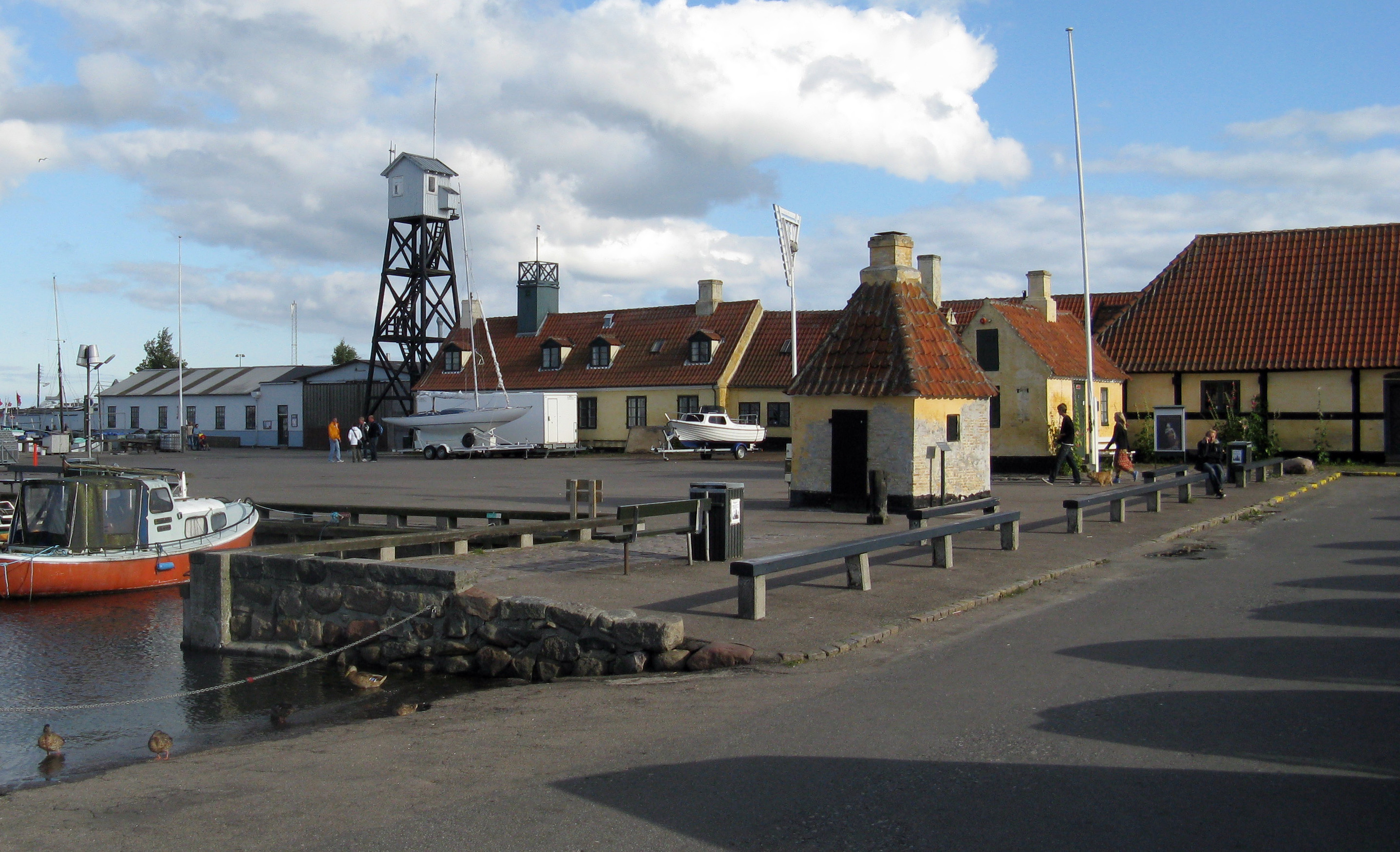 Dragør Havn med lodsmuseum og Dragør Museum til højre.